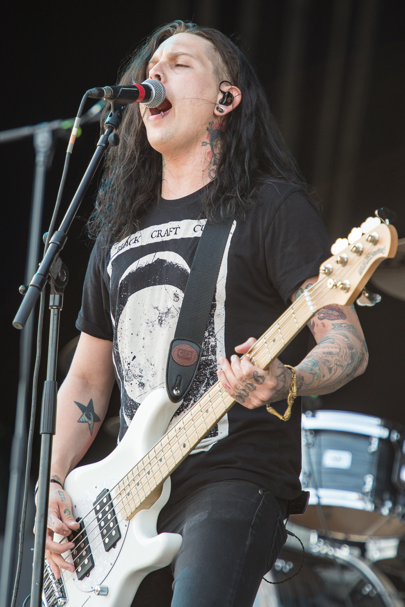 ARGO-Konzerte,Centerstage,Falling in Reverse,Konzert,Livekonzert,Livemusik,Max Green,Musik,RiP,Rock im Park 2014